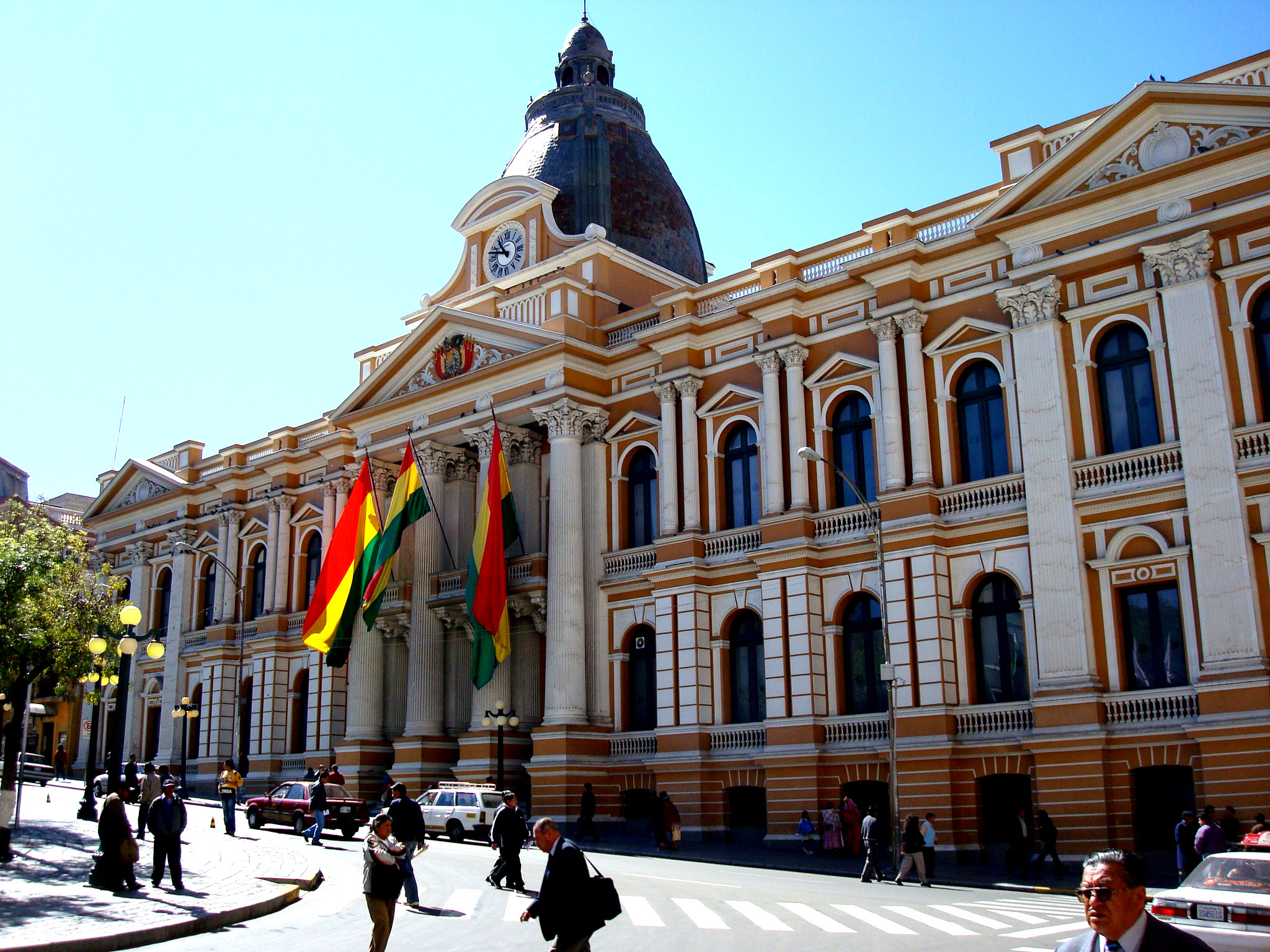 Nunca vi a Don Evo.